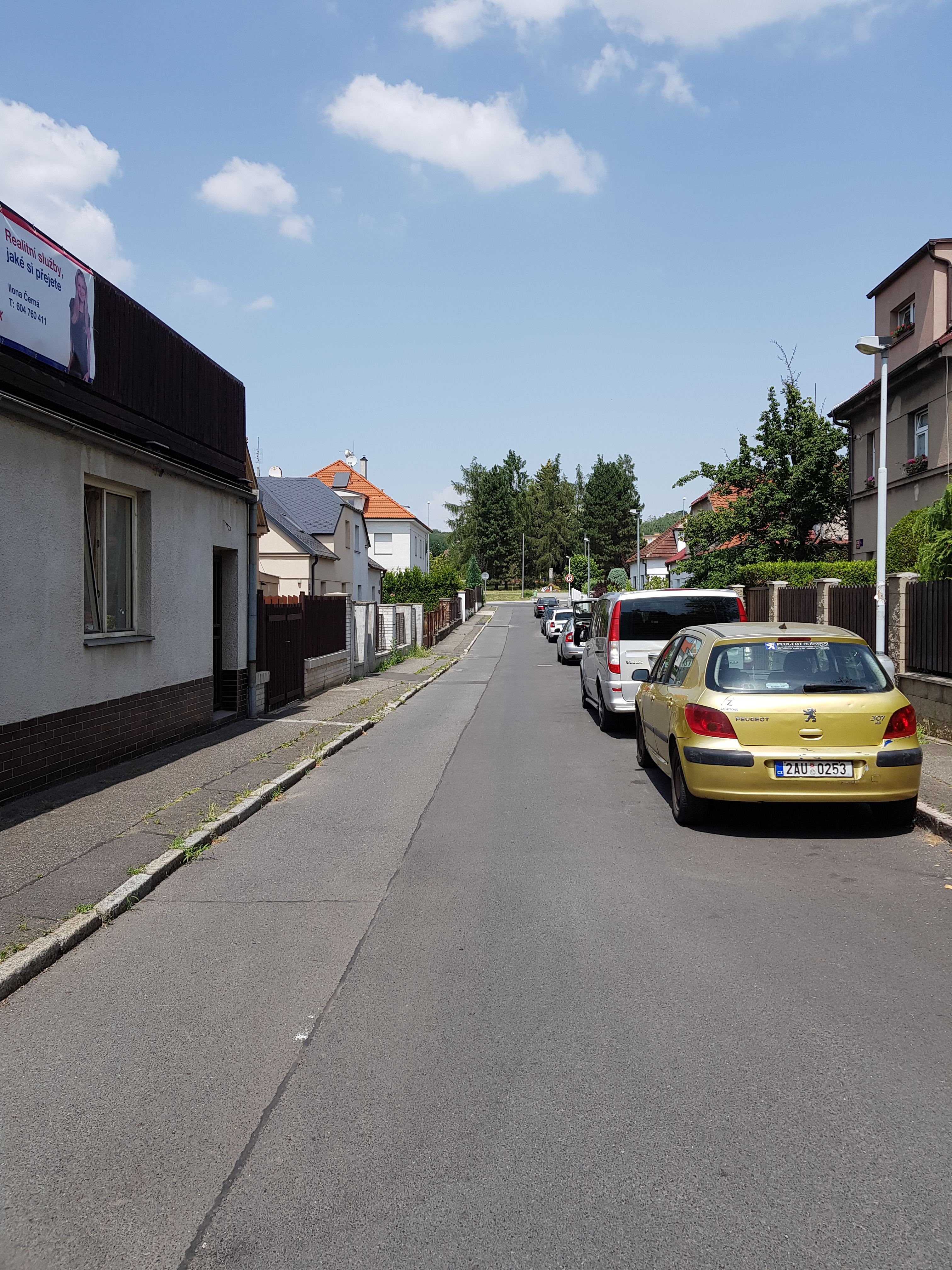 Milovická ulice, Praha-Hloubětín, pohled od jihu